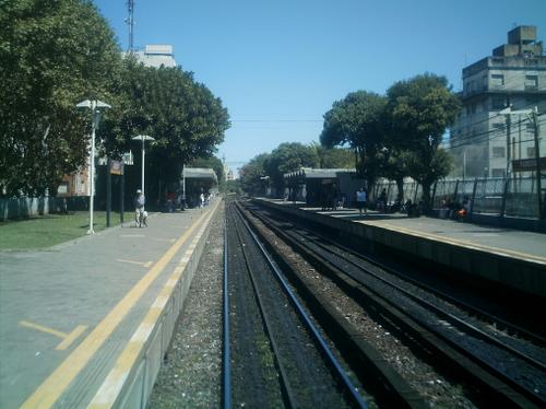 Estación Floresta, Buenos Aires